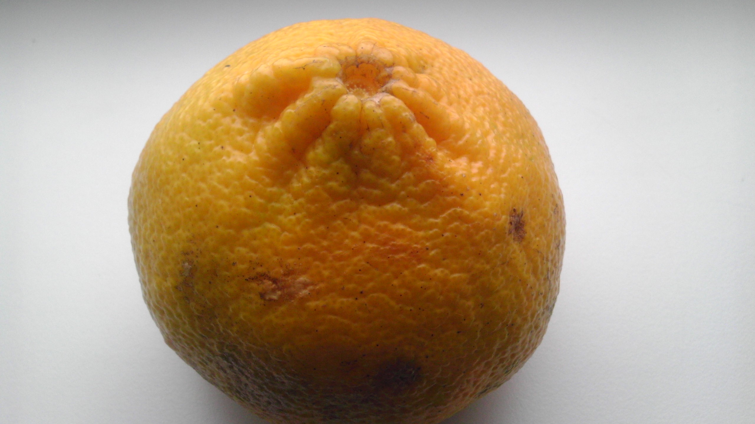 Uglipuu vili